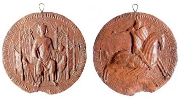 segell major -flaó- del pere el cerimoniós (1343-1344)